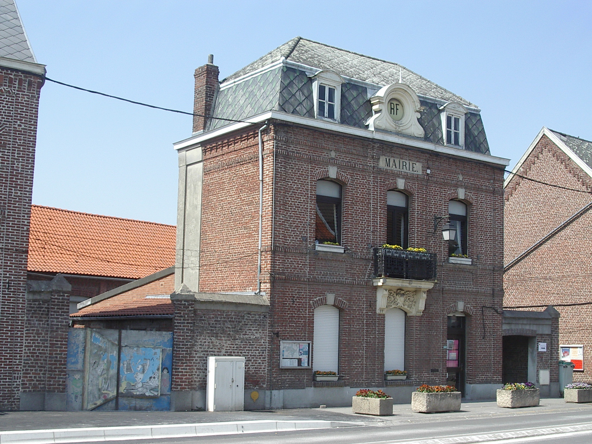 Mairie de Coutiches (France, Nord)